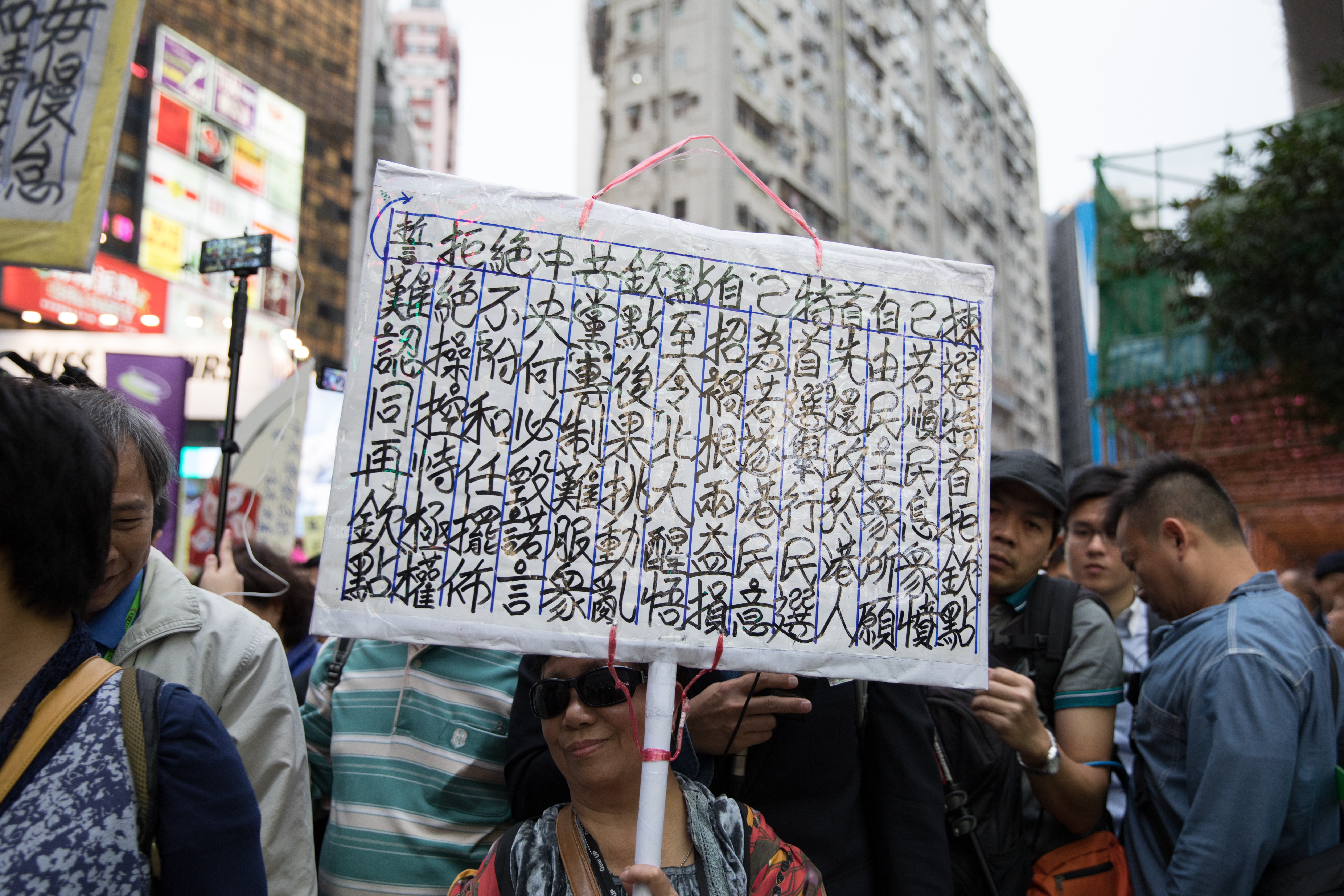 反對中共干預 自己政府自己揀